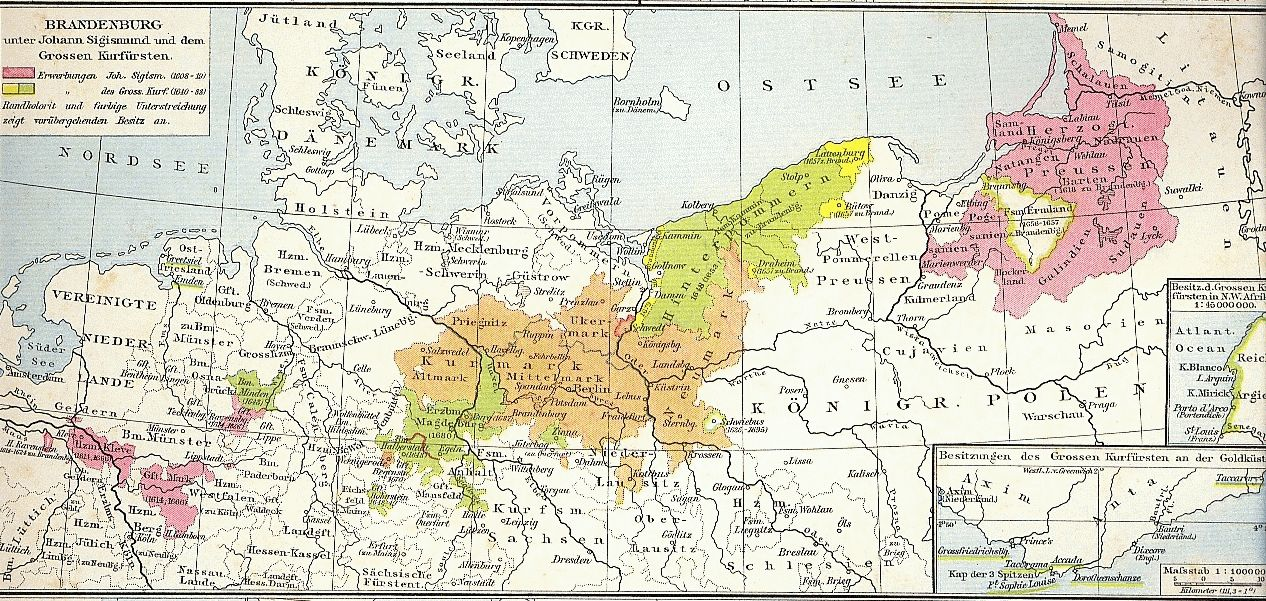 Bildbeschreibung: Brandenburg-Preußen zur Zeit des Großen Kurfürsten